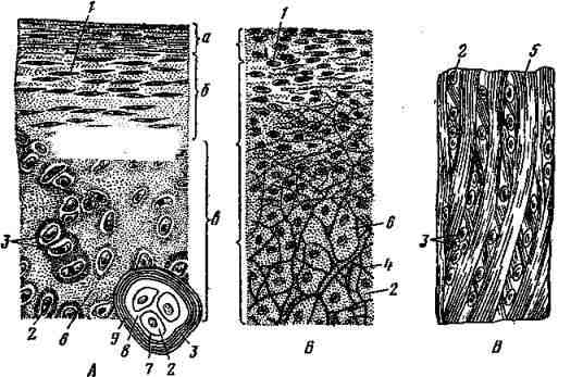 Xondirositlərin quruluşu Hialin qığırdaq toxuması,Elastik qığırdaq toxuması və Kollagen qığırdaq toxumasının quruluşu